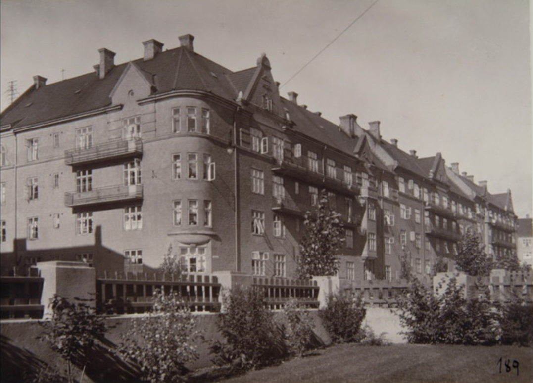 Omsens gate 10-14, sett fra hjørnet av Hegermanns gate (nr. 13), sanns. 1920-tallet.